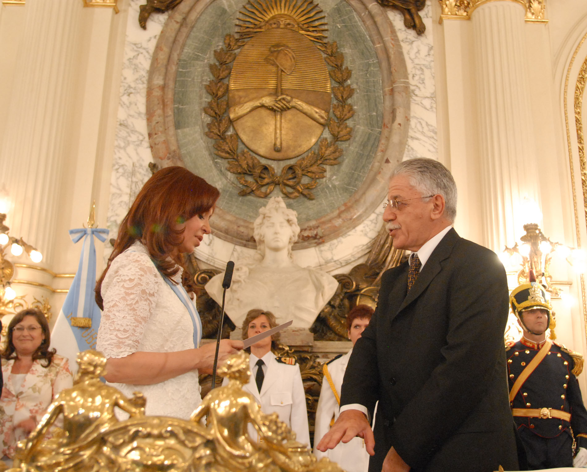 La presidenta Cristina Fernández toma juramento al ministro de Educación Juan Carlos Tedesco.